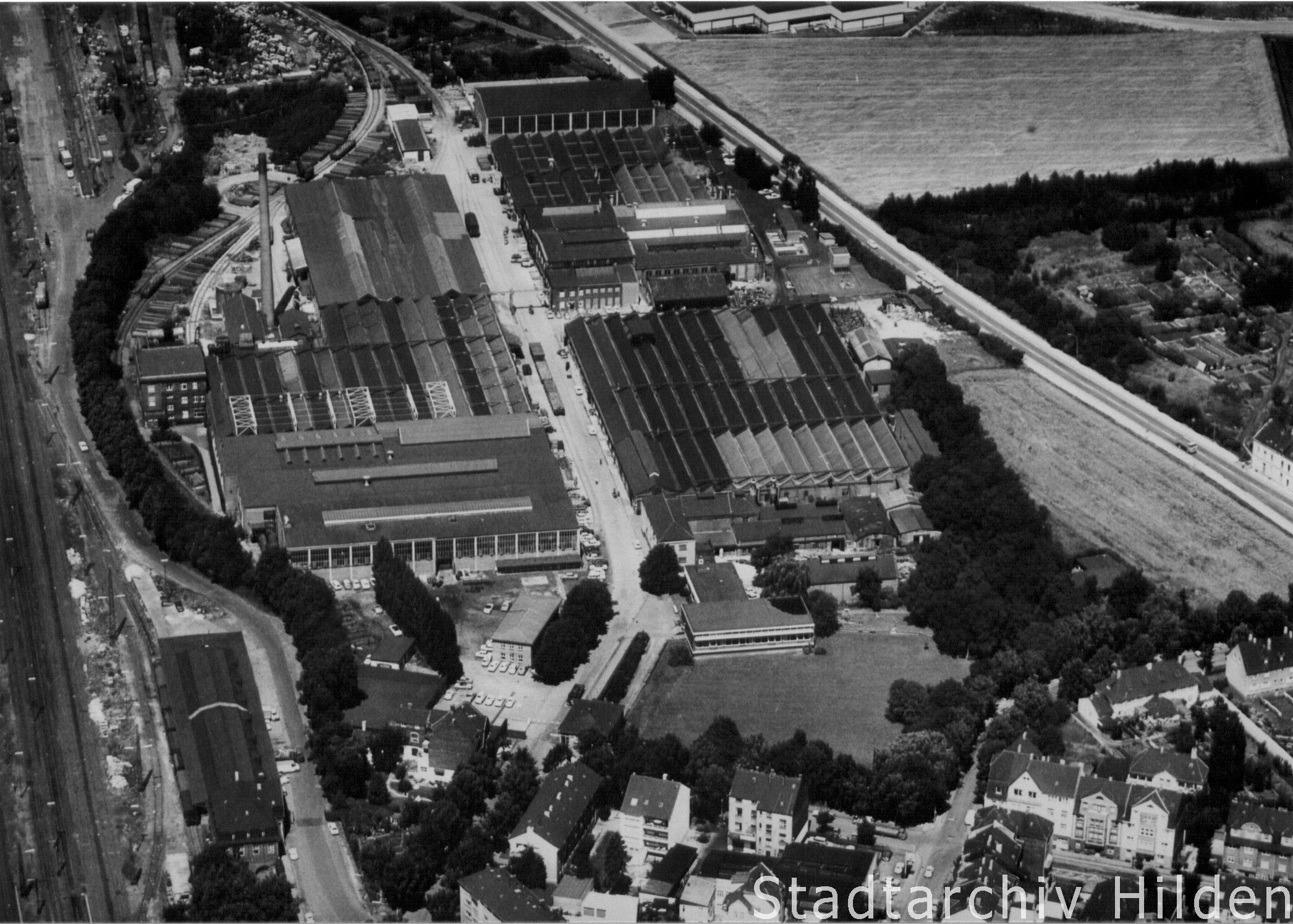 Luftbildaufnahme